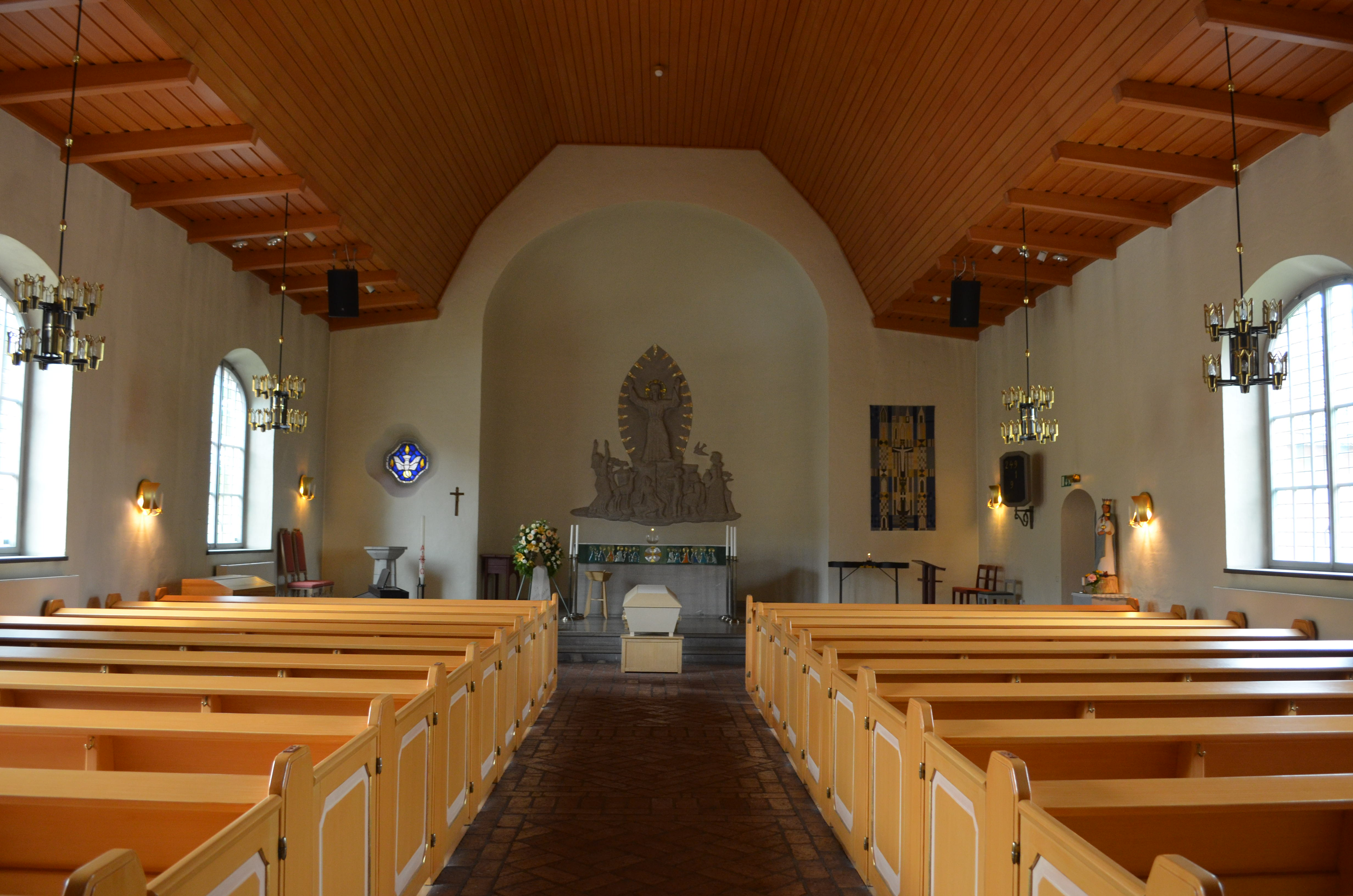 Advents kyrka i Hallsberg kyrksalen